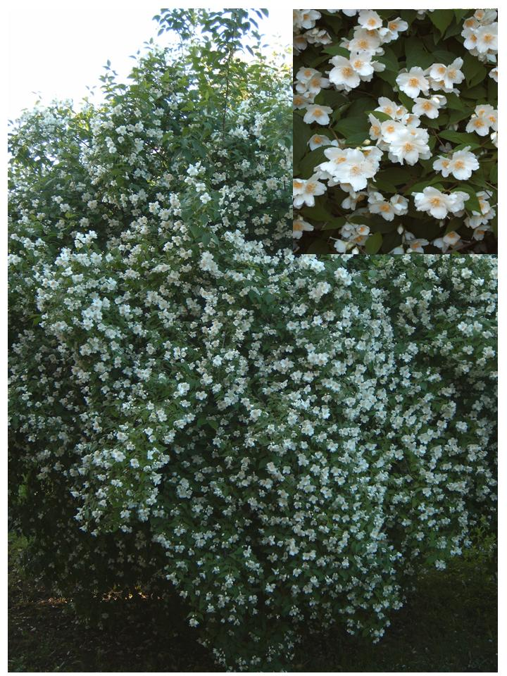 Pfeifenstrauch in voller Blüte + Insert vergrösserte Blüten